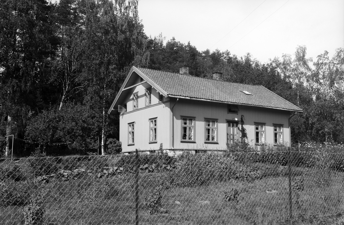 Den gamle skolen på Klemetsrud, ca 1935